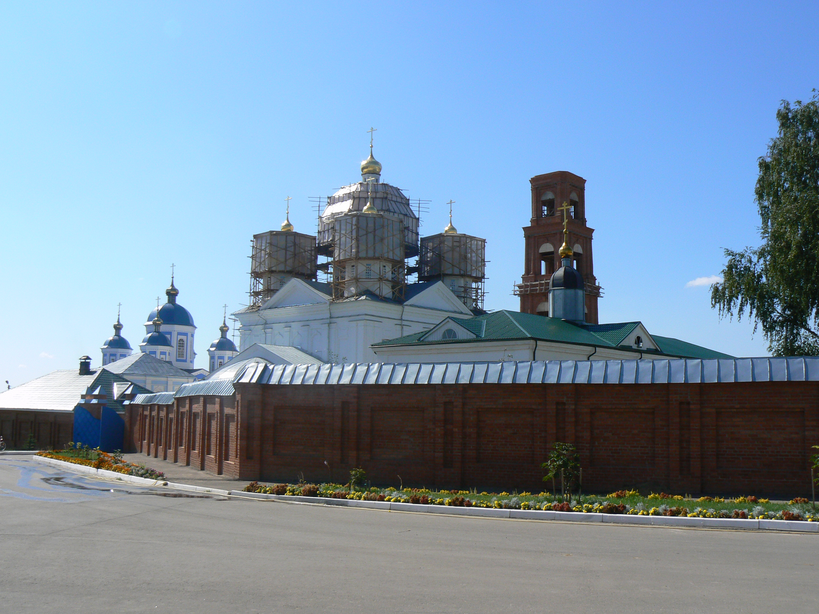 Оранский богородицкий мужской монастырь